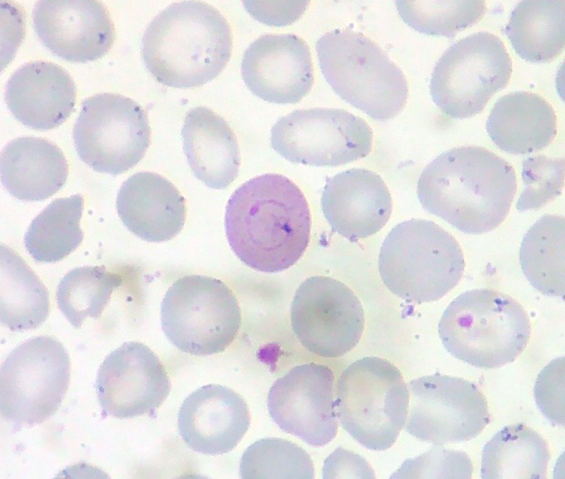 Anillo de Cabot, mejorado el contraste y la saturación. Coloración May-Grúnwald-Giemsa